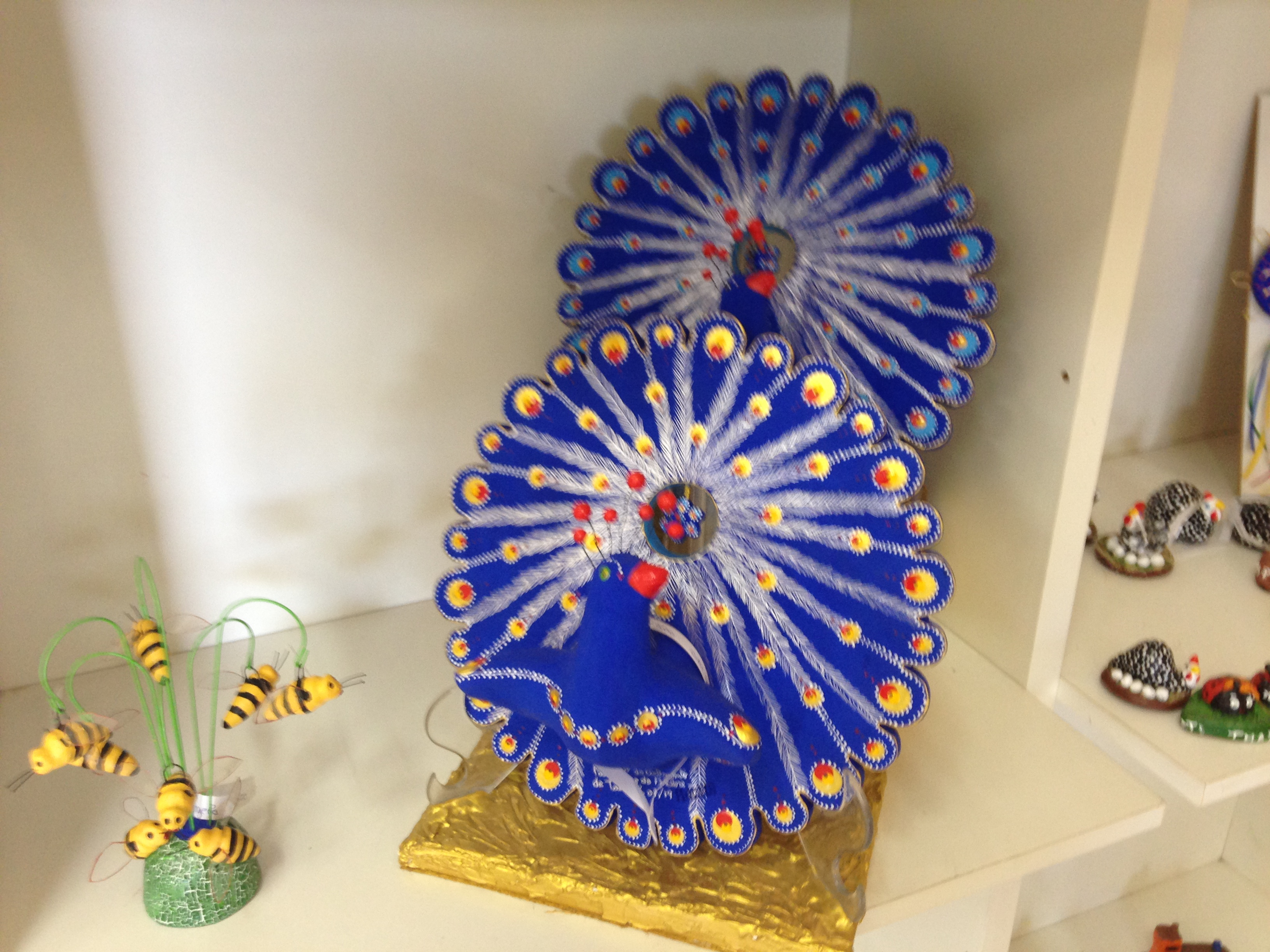 Pavão exposto na Casa dos Figureiros - O pavão é a figura mais famosa confeccionada na casa.